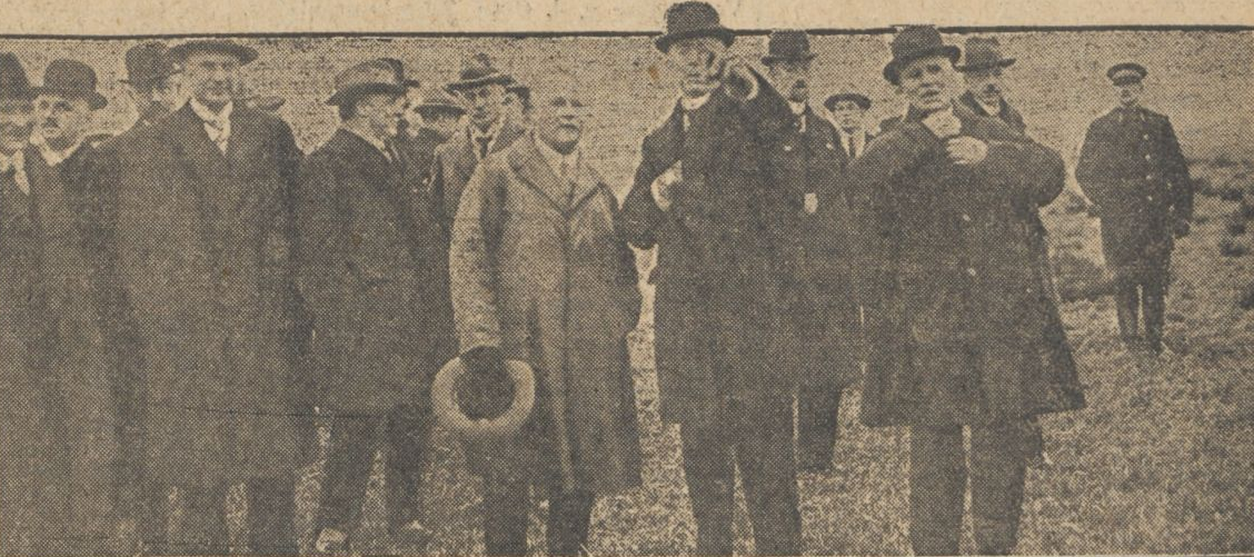 Wethouder Hoenderken (van de gemeente Haren) geeft minister Kan inlichting over de ruilverkaveling van de Noordlaardermade